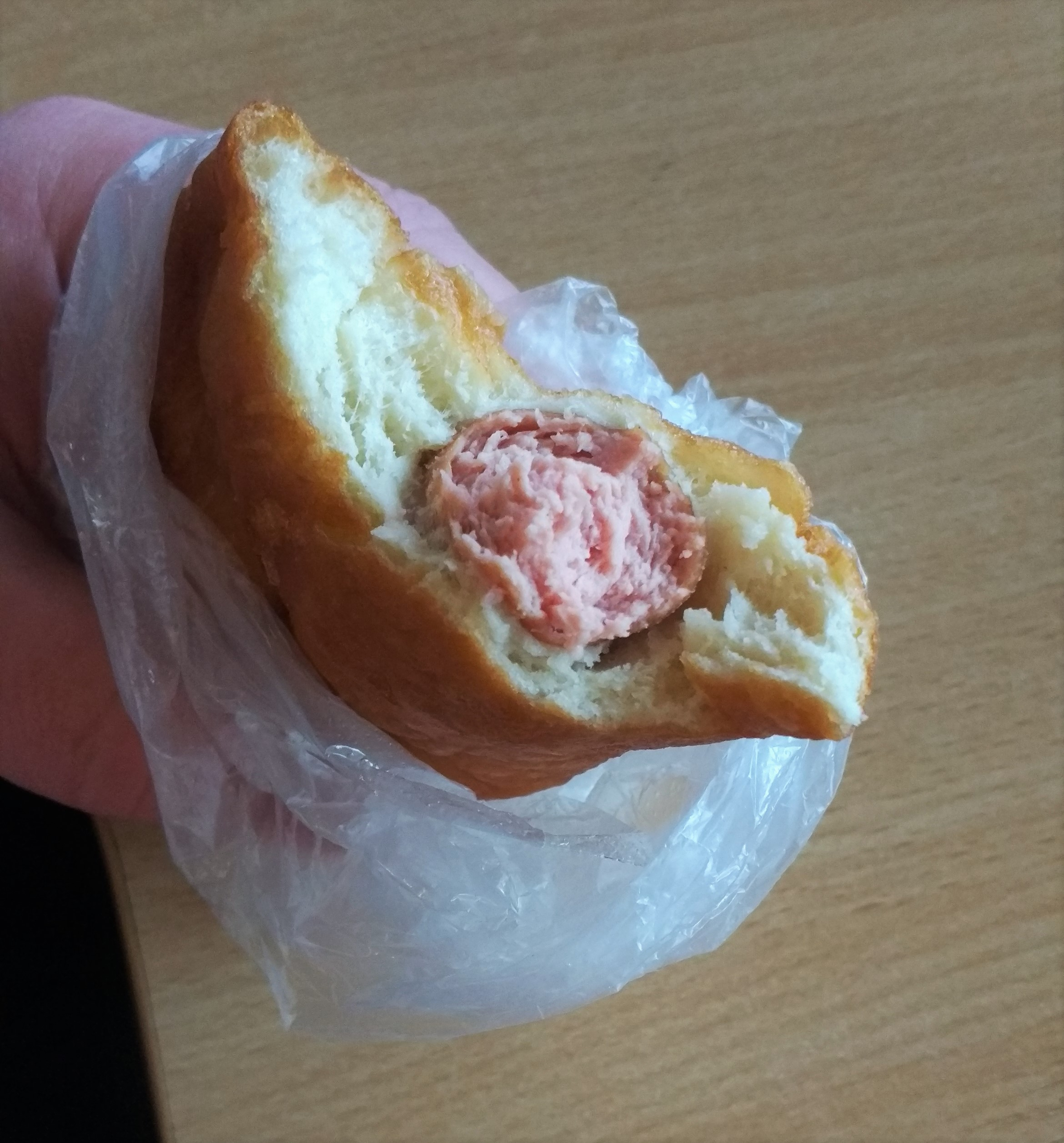 Сосиска у київській перепічці